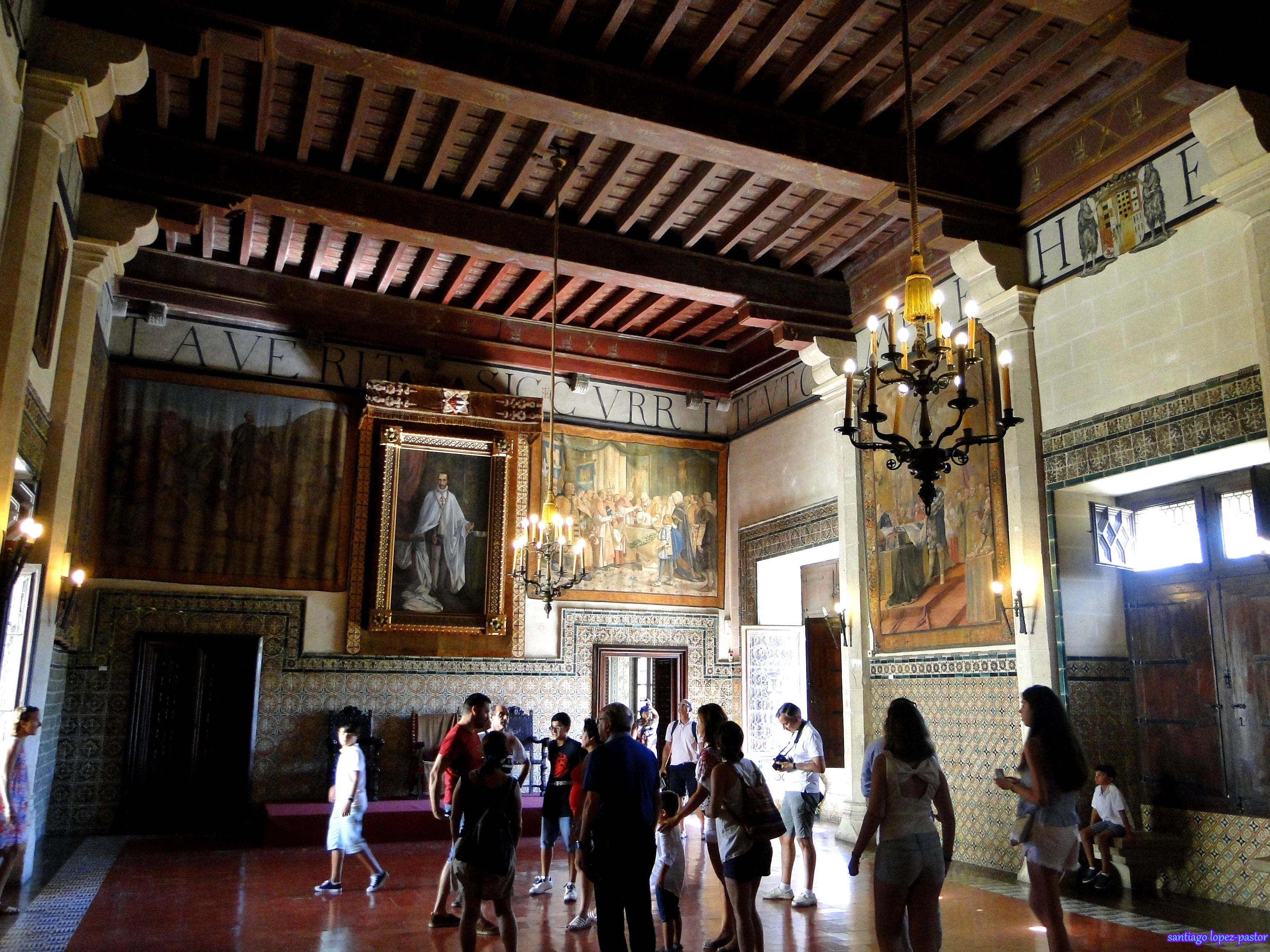 Palau Ducal de Gandia, Valencia.